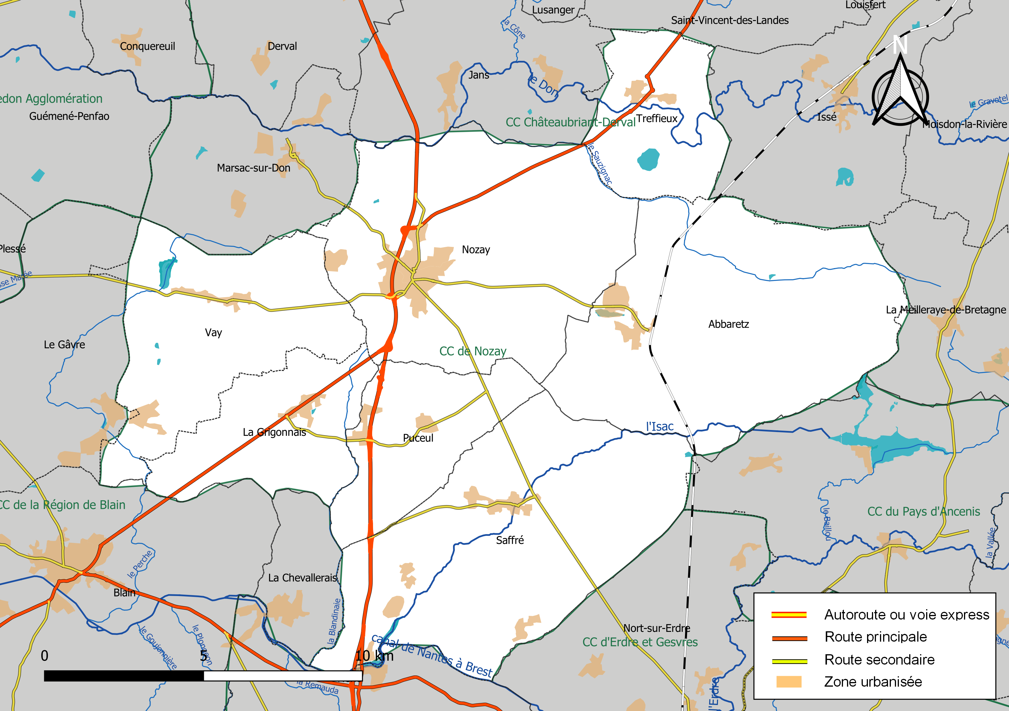 Carte géographique de la Communauté de communes de Nozay, département de la Loire-Atlantique, France. Composition au 1er janvier 2019.